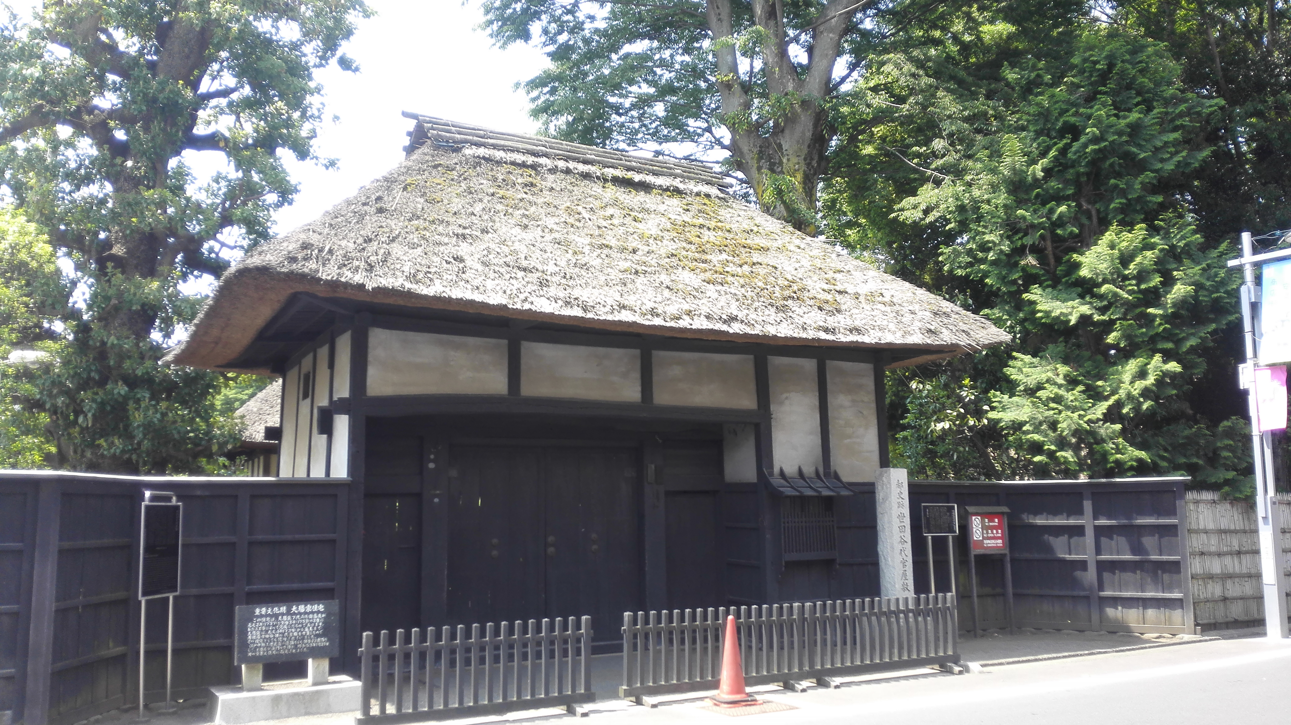 世田谷代官屋敷の表門